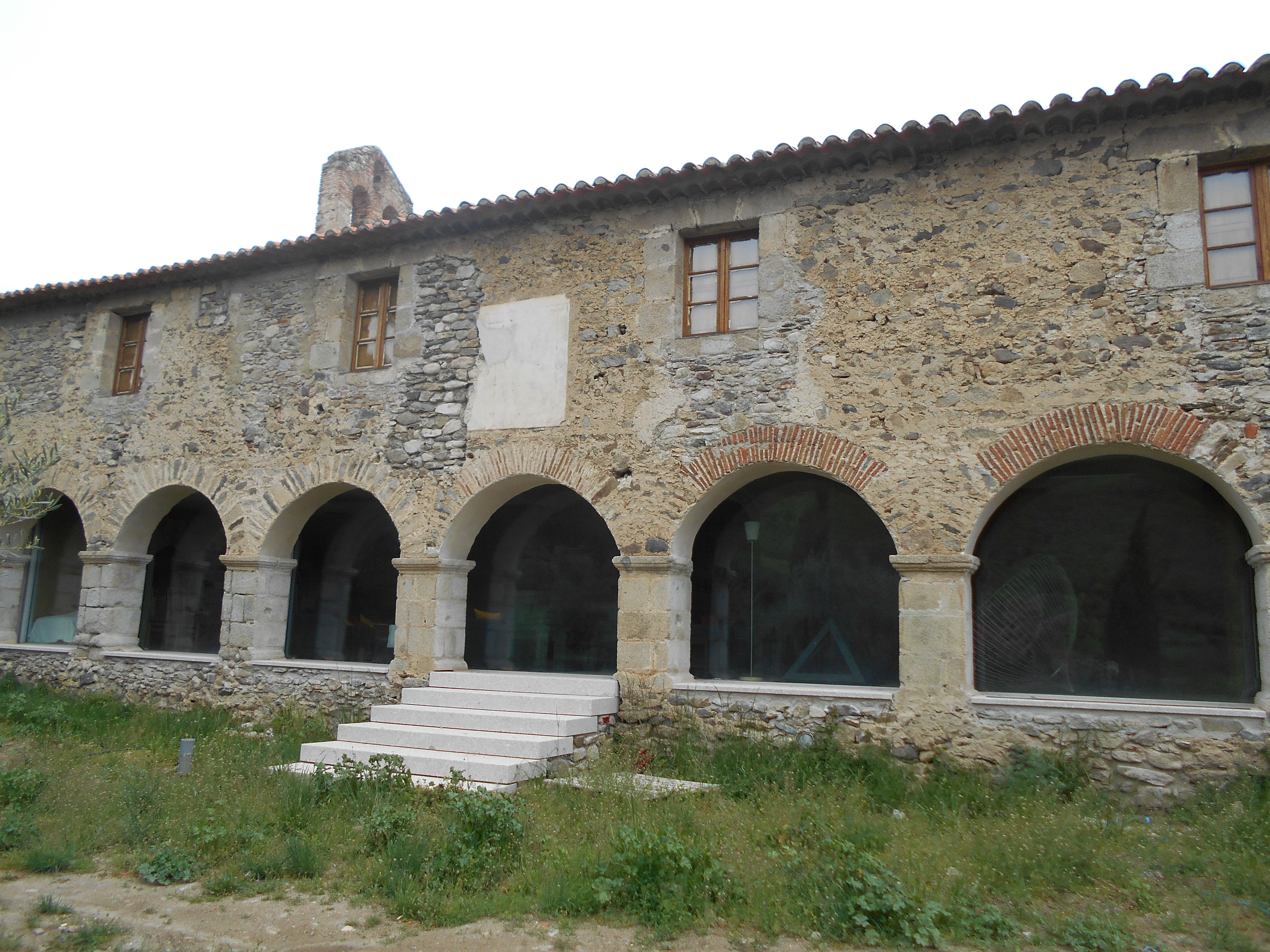 Santa Maria de Corbiac, a Mosset. Claustre